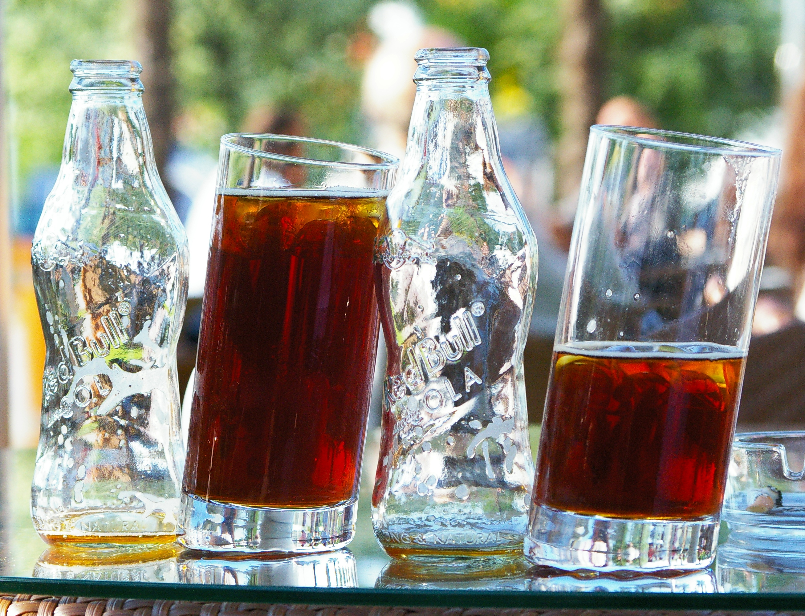 Red Bull Cola Flaschen für Gastronomiebetriebe